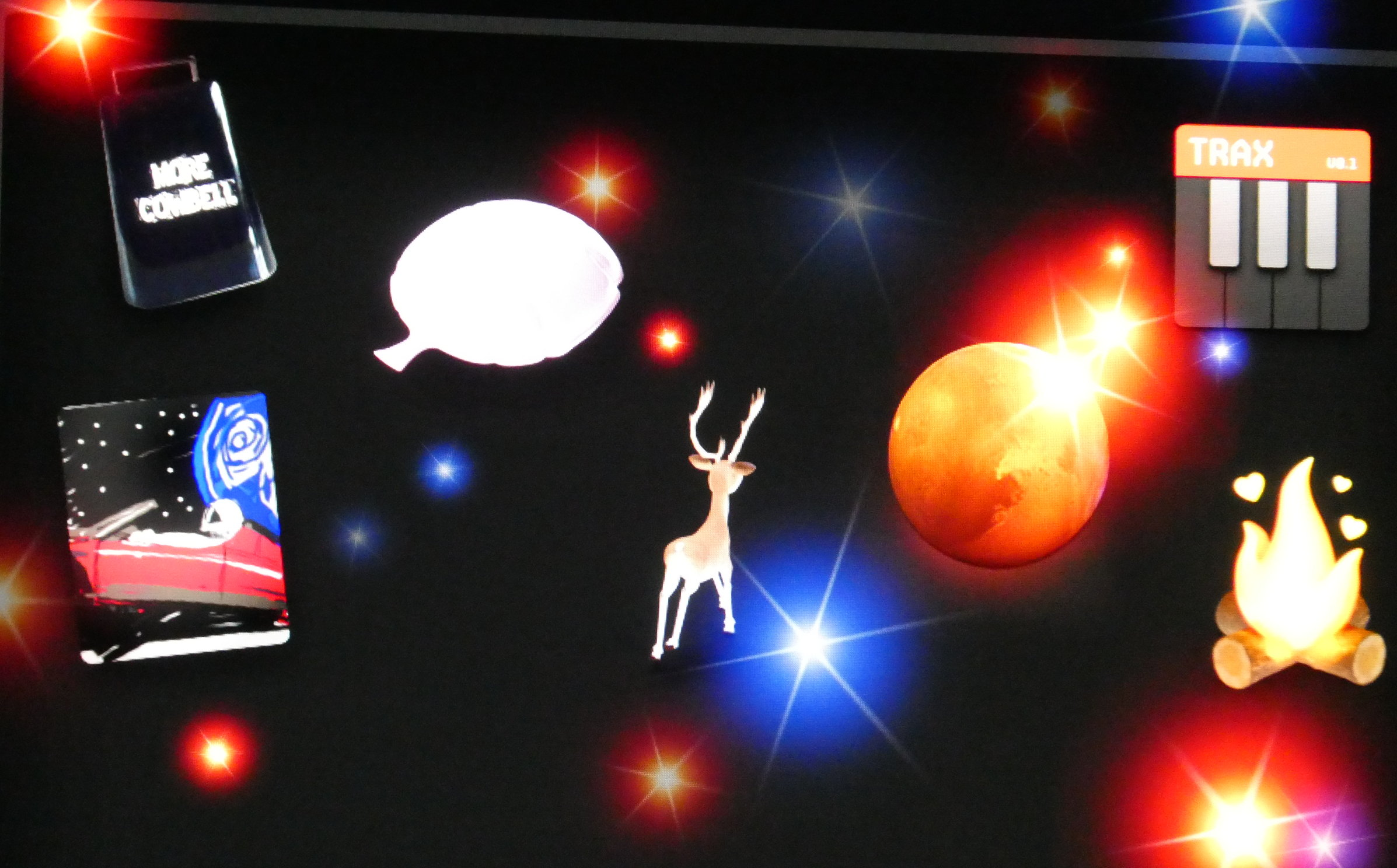 Cesta de huevos de Pascua en vehículos Tesla. Pulse la T en la parte superior de la pantalla y tras ver la pantalla Acerca de su Tesla, espere a que se abra la cesta.